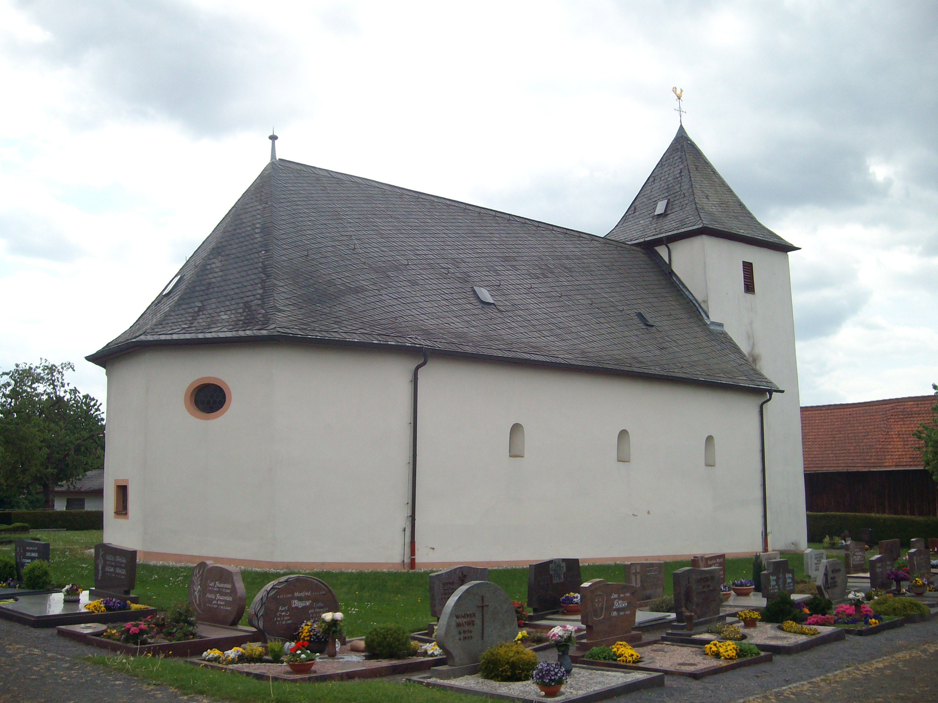 Evangelische Kirche Stangenrod, Grünberg, Landkreis Gießen, Hessen, Deutschland